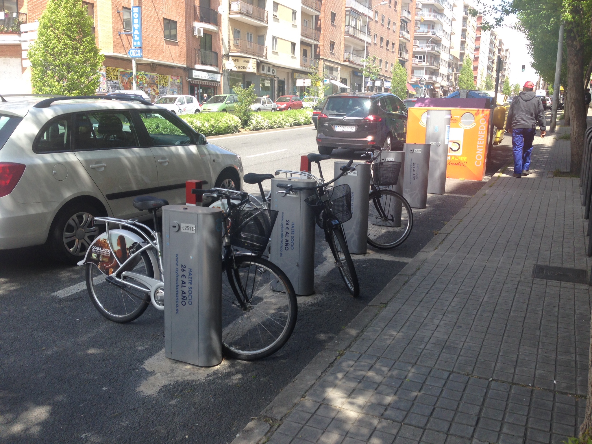 Estación de préstamo de bicicletas en Salamanca